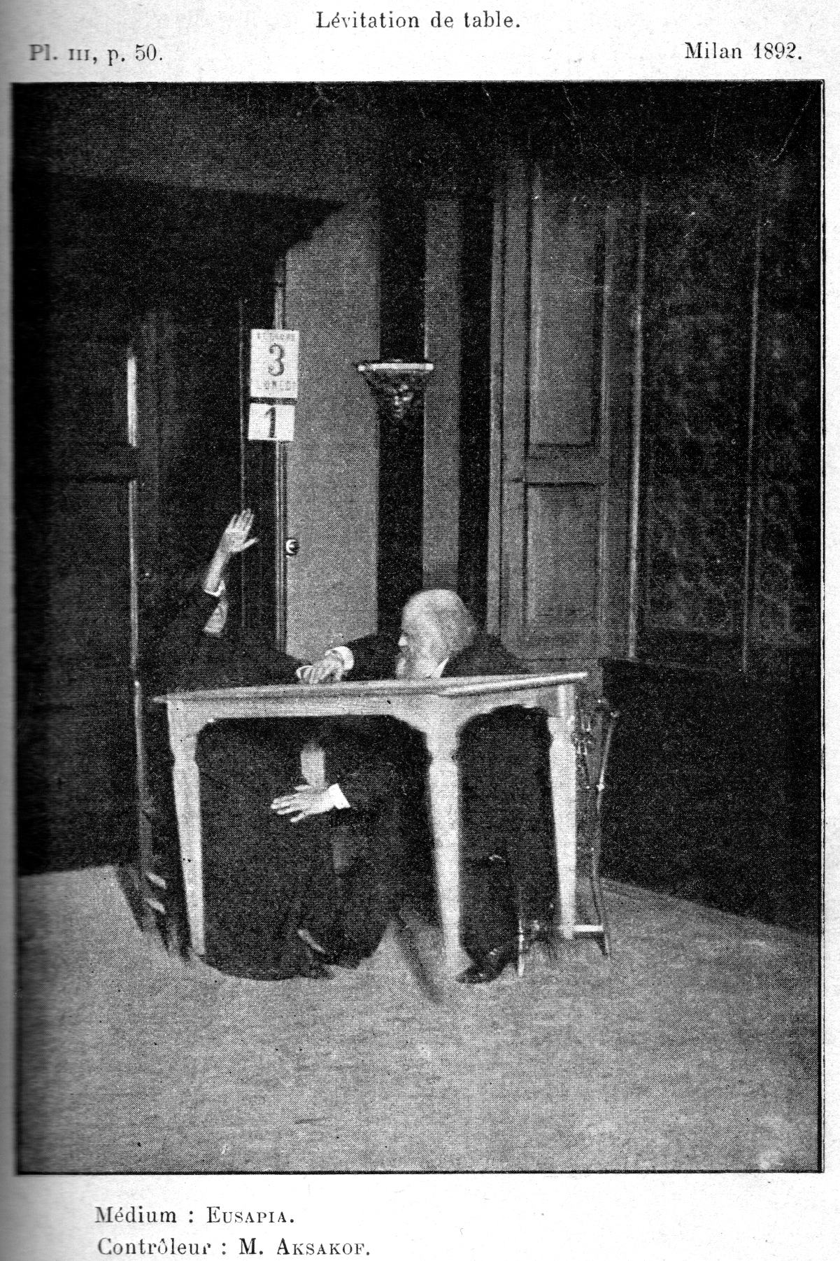 Le professeur Aksakof réalisant une expérience d'observation sur la médium Eusapia, à Milan, en 1892